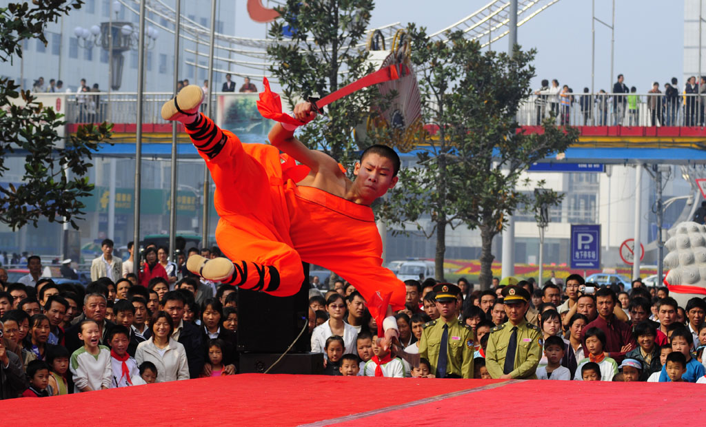 少林武僧表演双刀